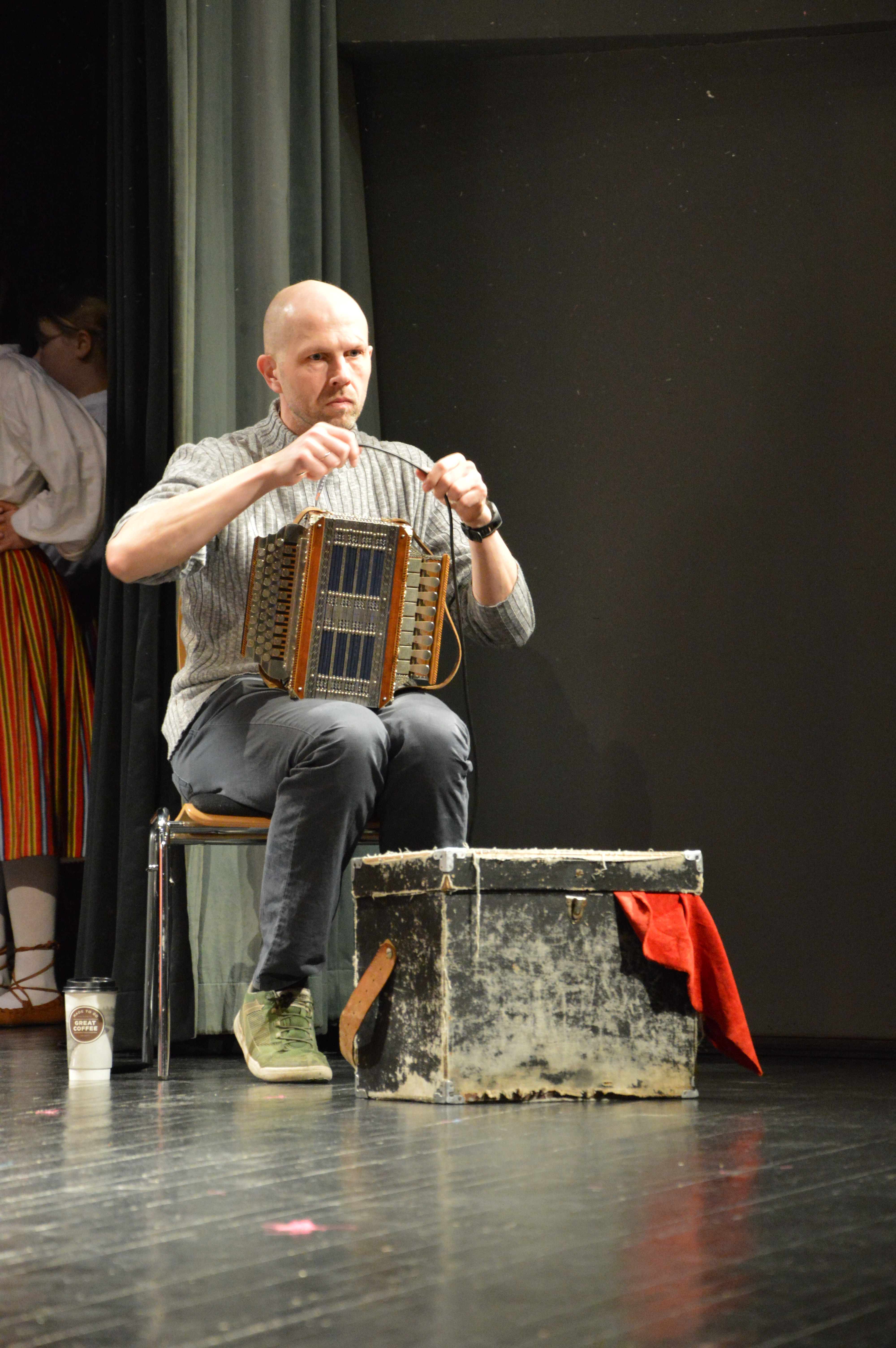 Kaido Reivelt Võru kultuurimajas Kannel valmistumas Tartu Ülikooli Rahvakunstiansambli kontsertiks.